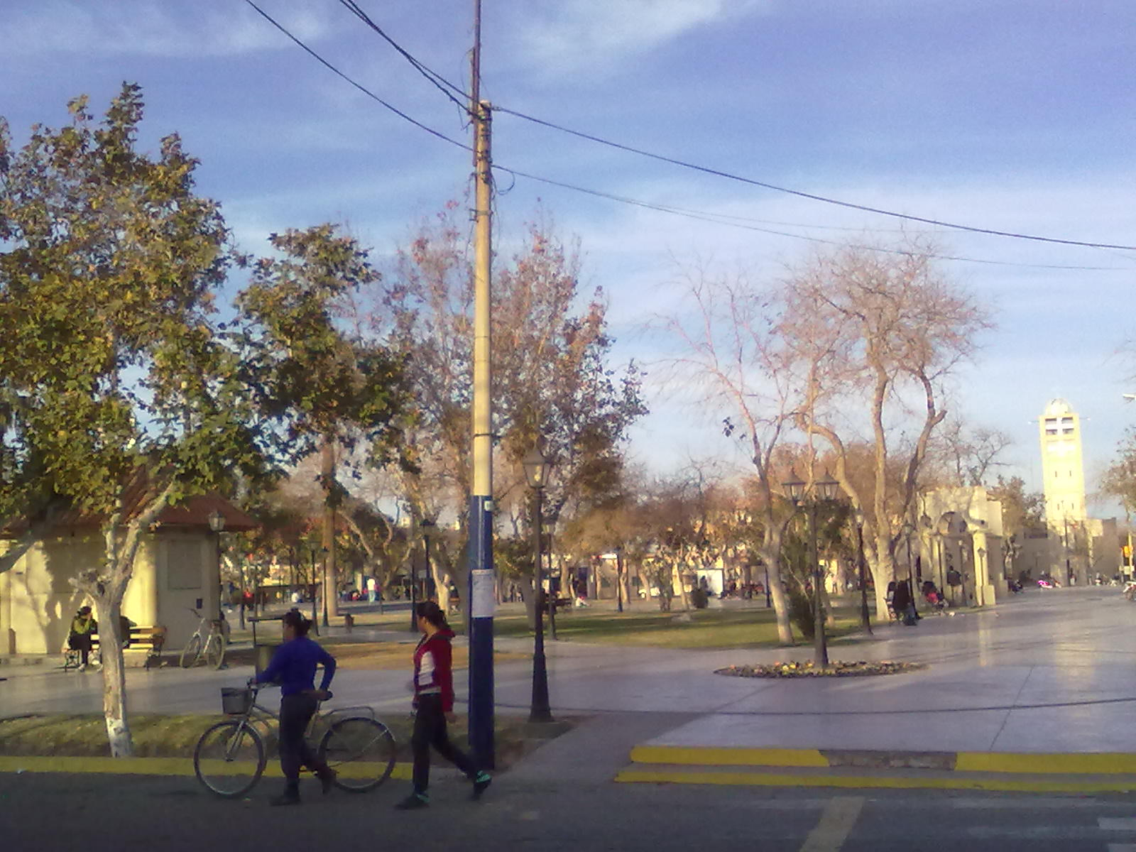 la plaza principal con vista a la calle princial